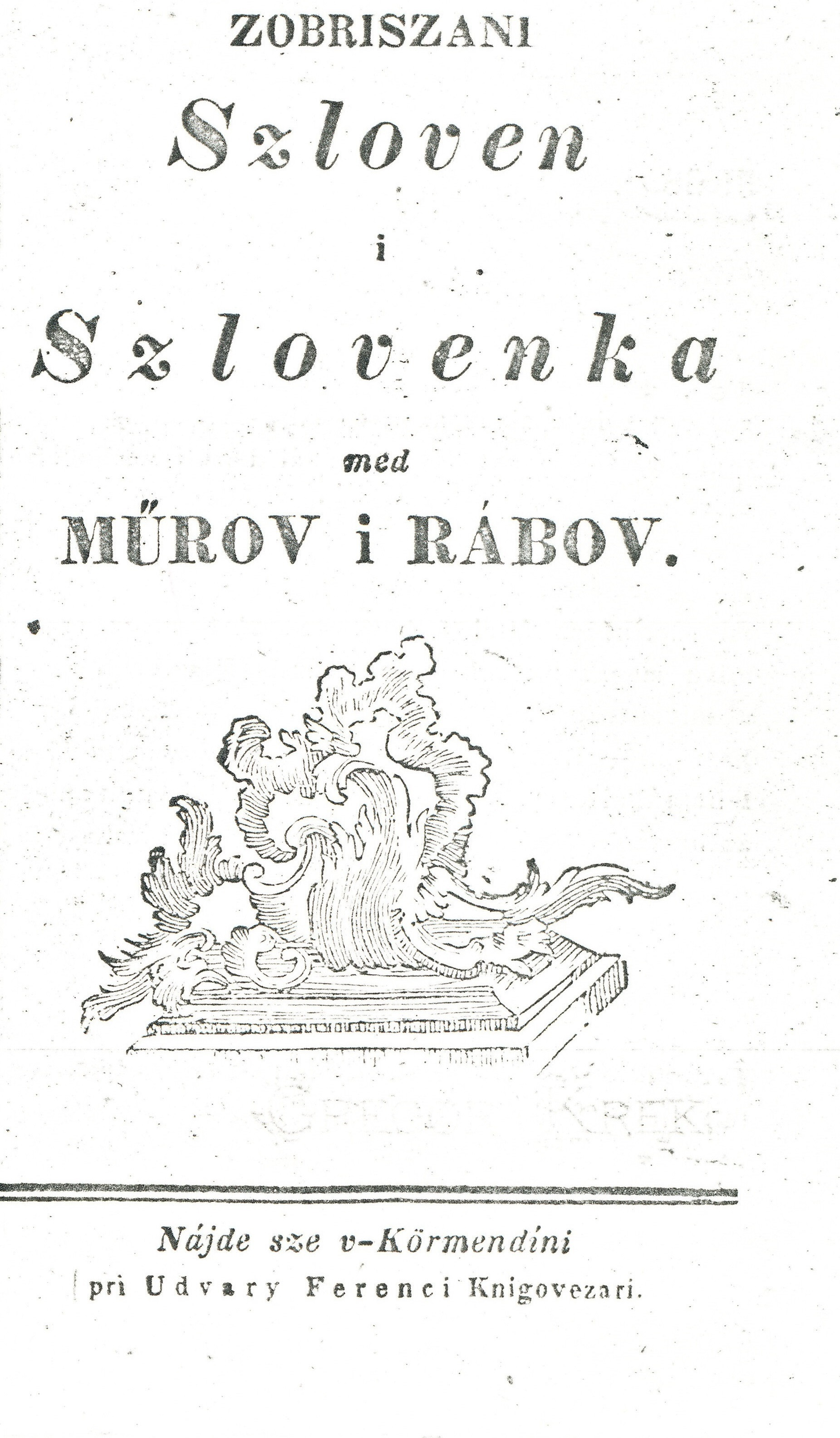 József Kossics: Zobriszani Szloven i Szlovenka med Műrov i Rábov, common courtesies